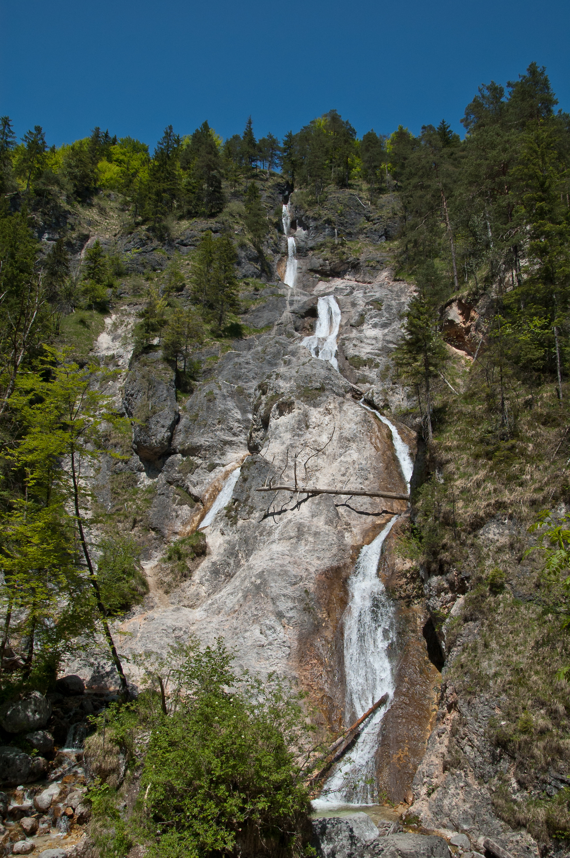 Der im Bereich der Klamm in den Almbach fallende Sulzer Wasserfall (Fallhöhe 114 m)